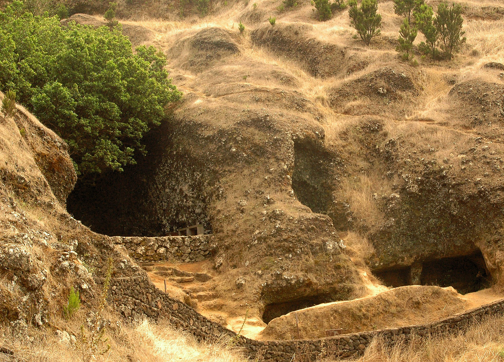 Árbol "Garoé" en isla de El Hierro (Canarias) y pozas de agua cercanas